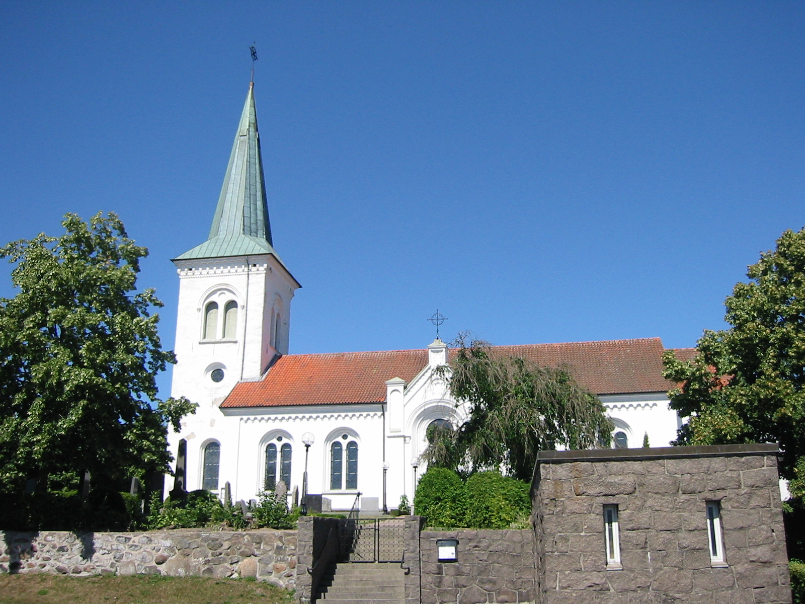 Asks kyrka.